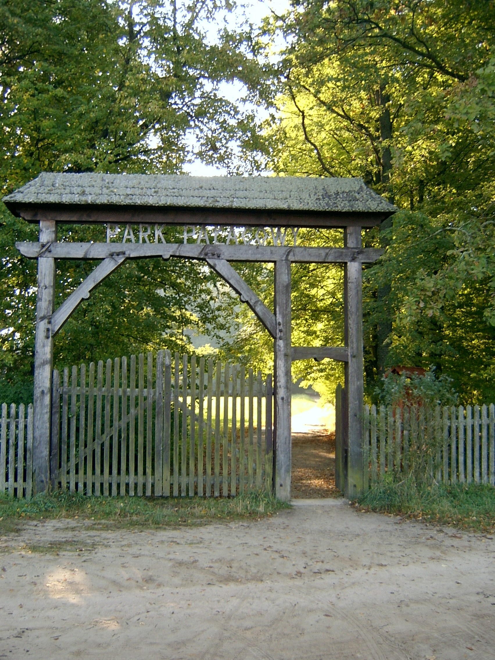 Białowieża-Nationalpark.